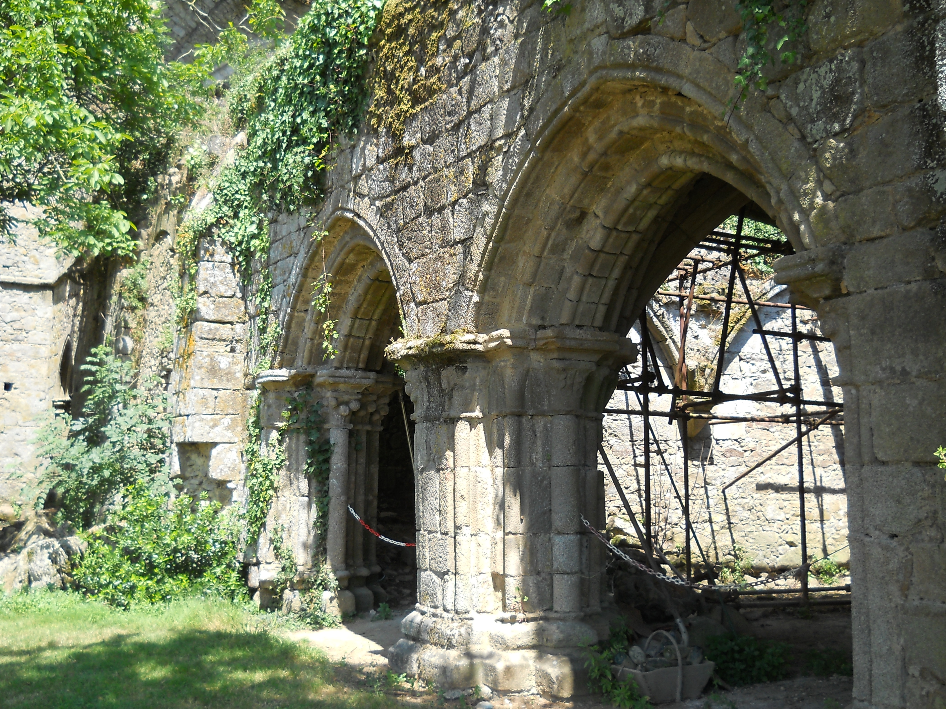 Portes ogivales de la salle capitulaire (Gothique angevin)